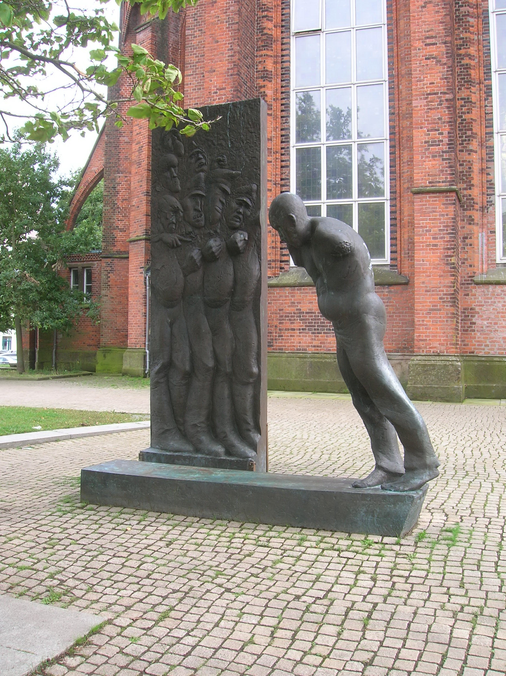 Antikriegsdenkmal bei der Großen Kirche in Bremerhaven.